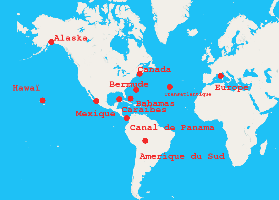 Les navires Carnival dans le monde